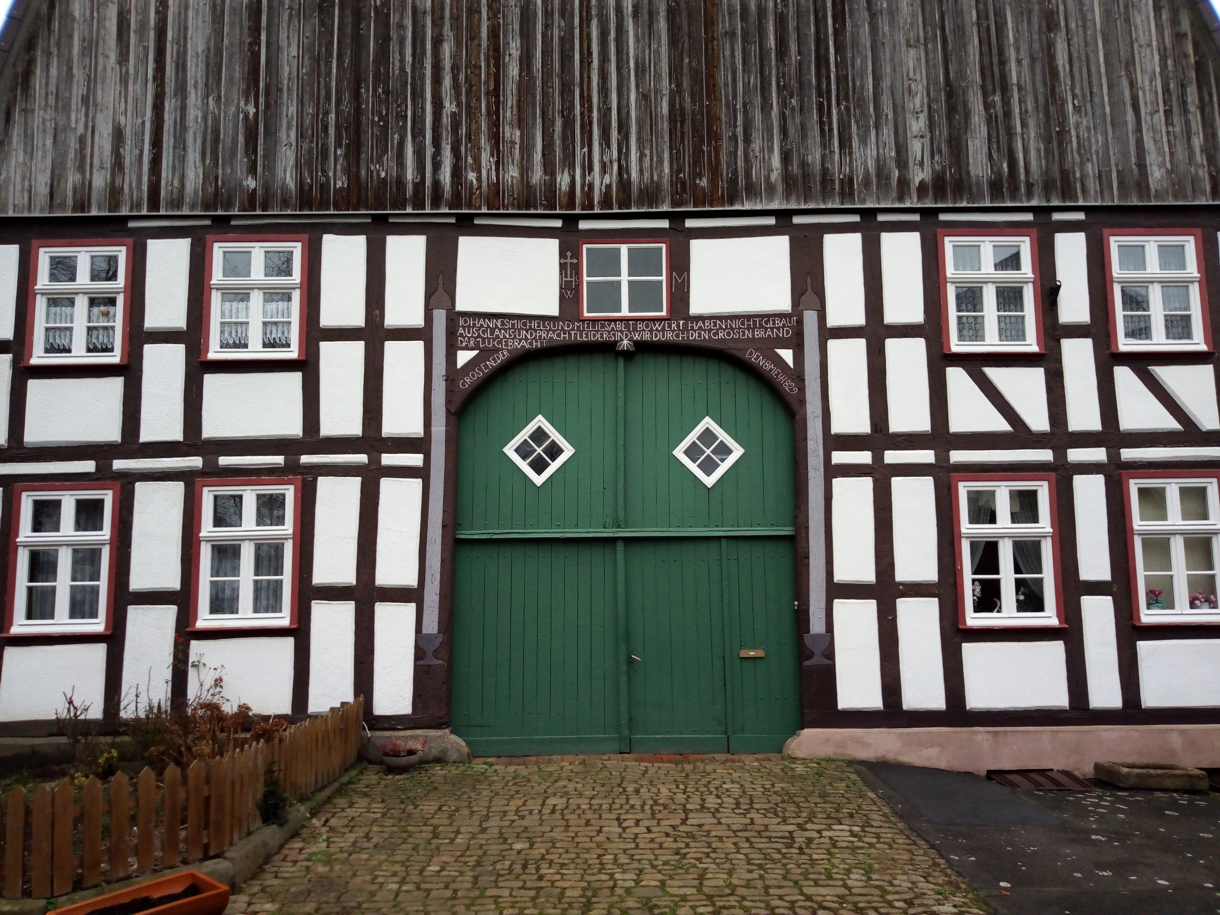 Michelshof (1829), Auf'm Thie, Großeneder, Borgentreich